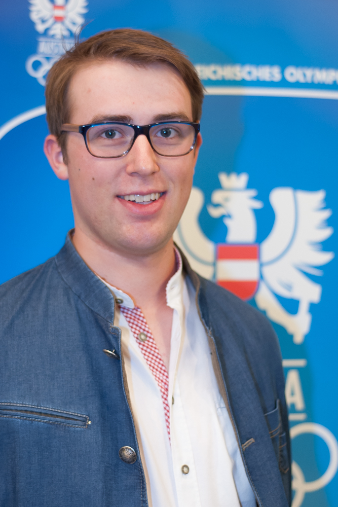 Einkleidung der Österreichischen Teilnehmer an den Olympischen Sommerspielen 2016 am 16./17. Juli 2016 in Wien. Bild zeigt Gernot Rumpler.